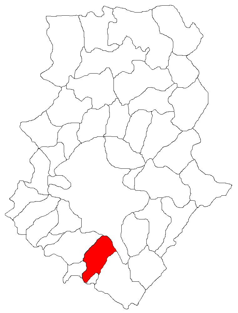 Categorie:Hărţi ale judeţului Ilfov